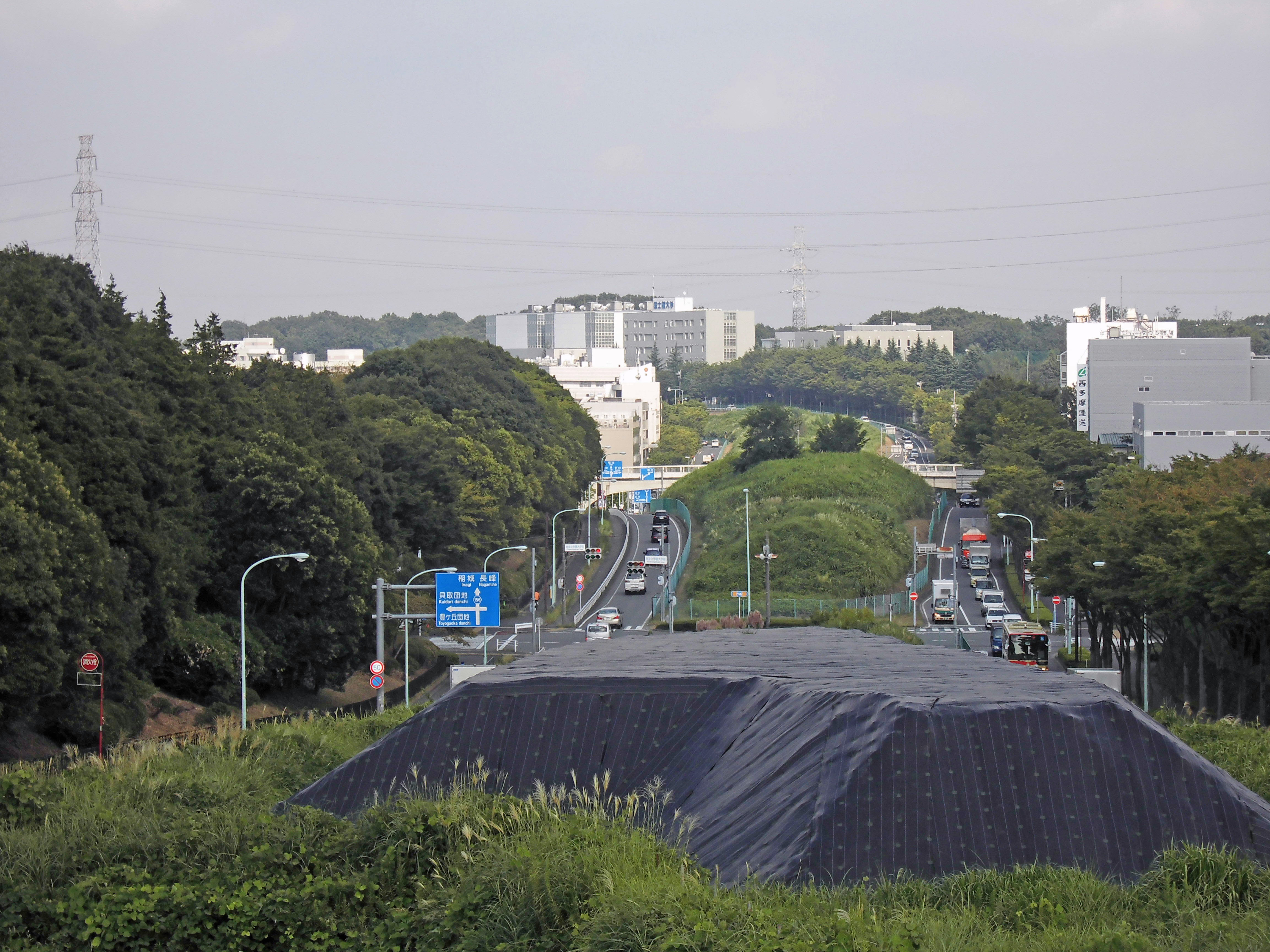 広大な中央分離帯に片側2車線の本線部分の建設が予定されている尾根幹線道路